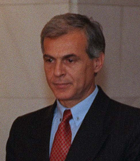 Министърът на отбраната на България Георги Ананиев по време на посещение на американския секретар по отбраната Уилям Коен в София.